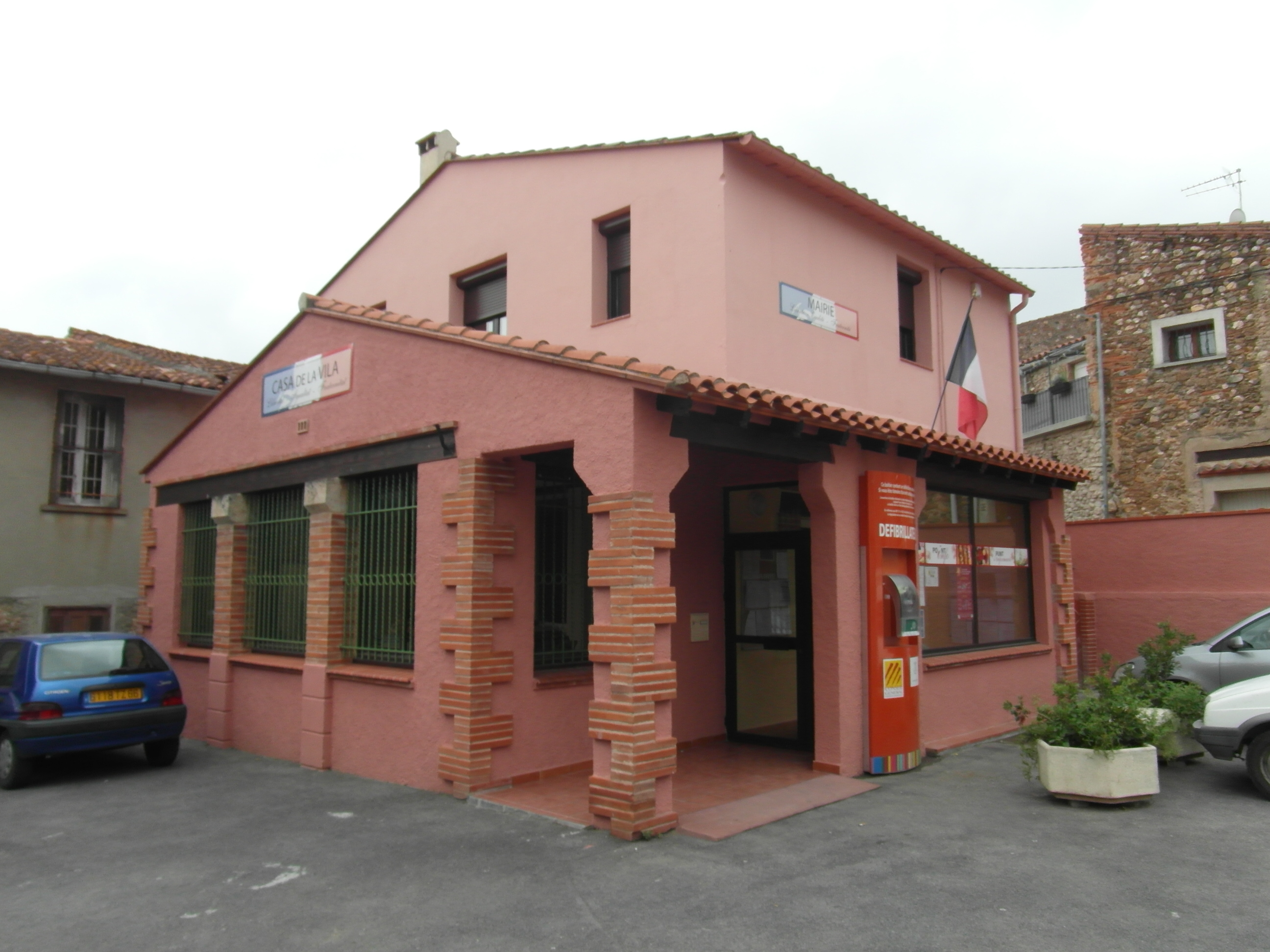 Mairie de Terrats